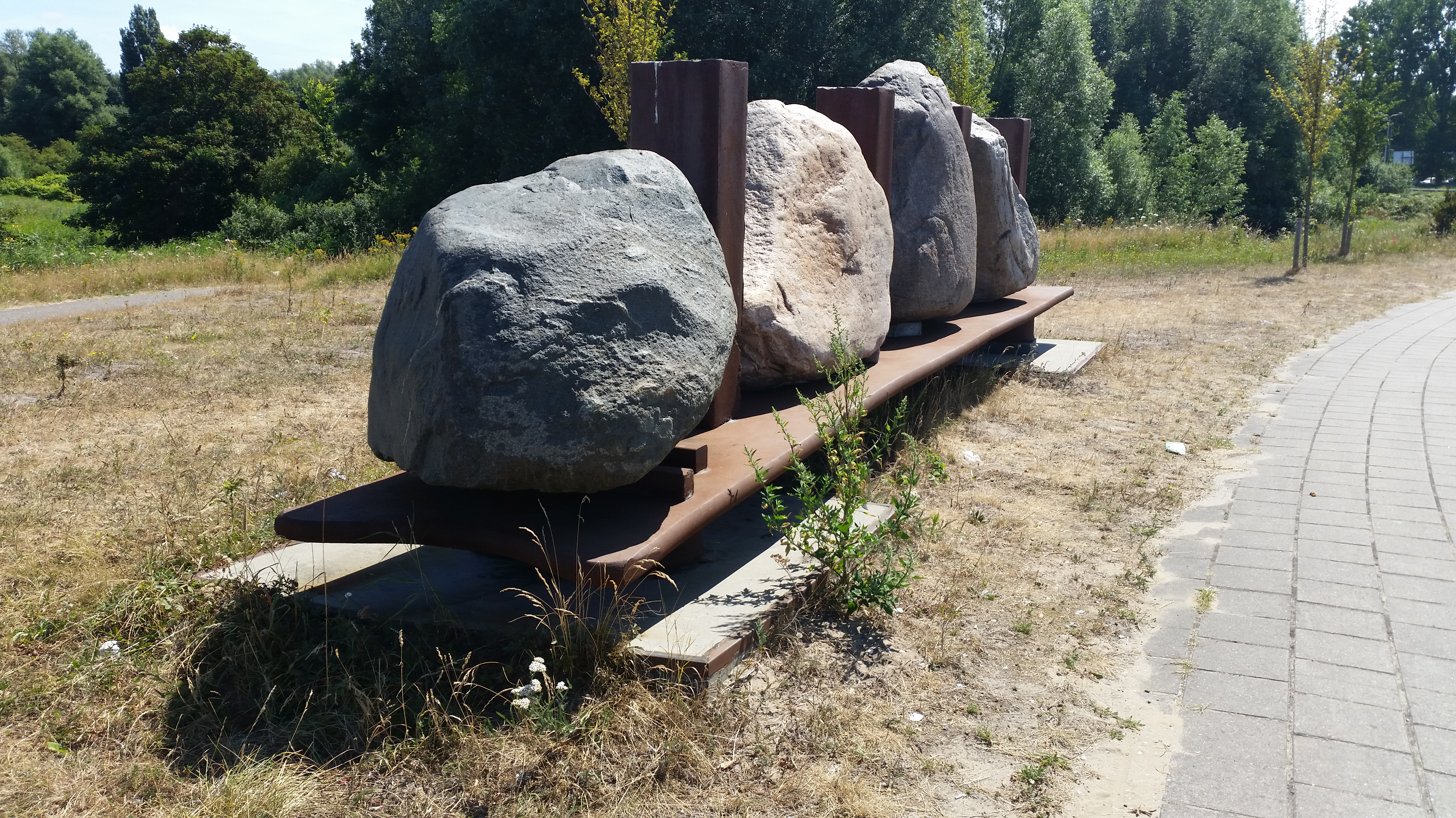 Beeldenroute Brettensuite, noord-zuid